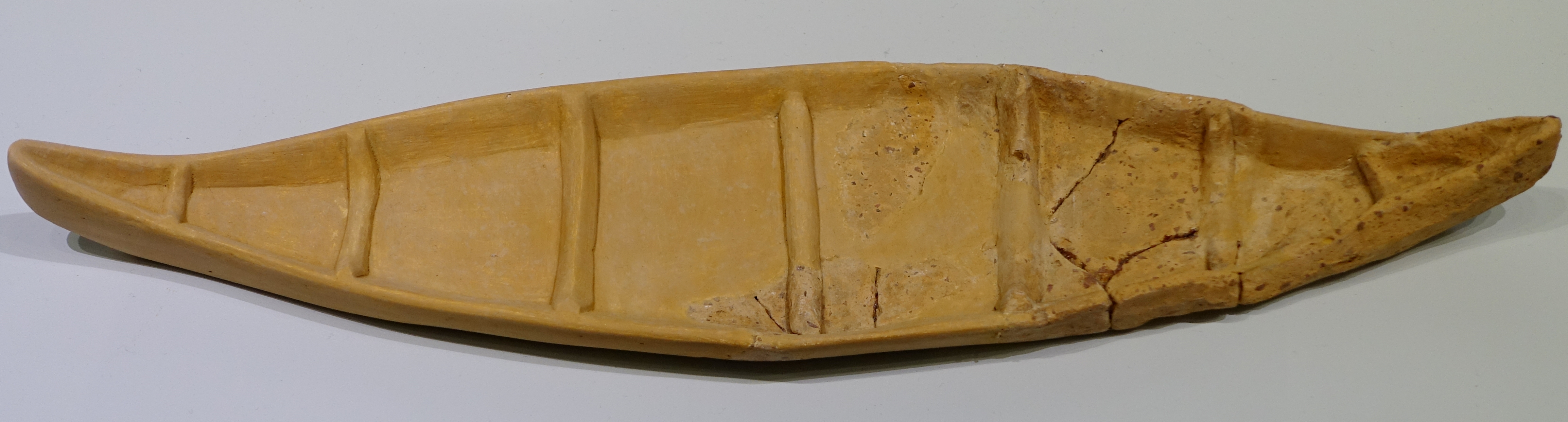 Tonmodell eines Schiffes vom Gipfelheiligtum Traostalos (1700–1500 v. Chr.), ausgestellt im Archäologischen Museum Iraklio, Kreta, Griechenland